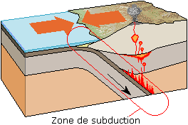 Schéma simplifié d'une zone de subduction Zona_de_subduccion_lmb.png